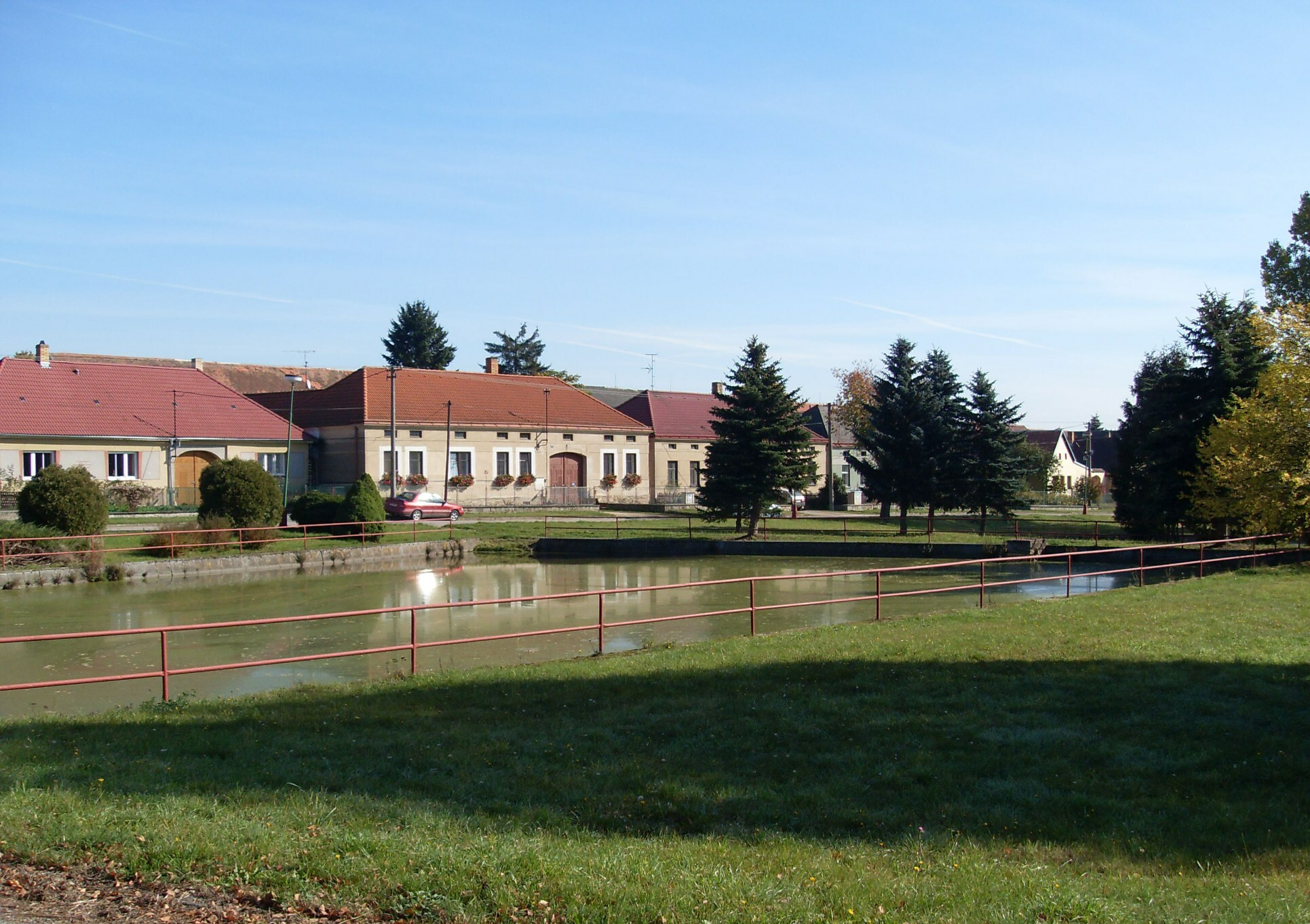 Česky: Náves v Holešicích